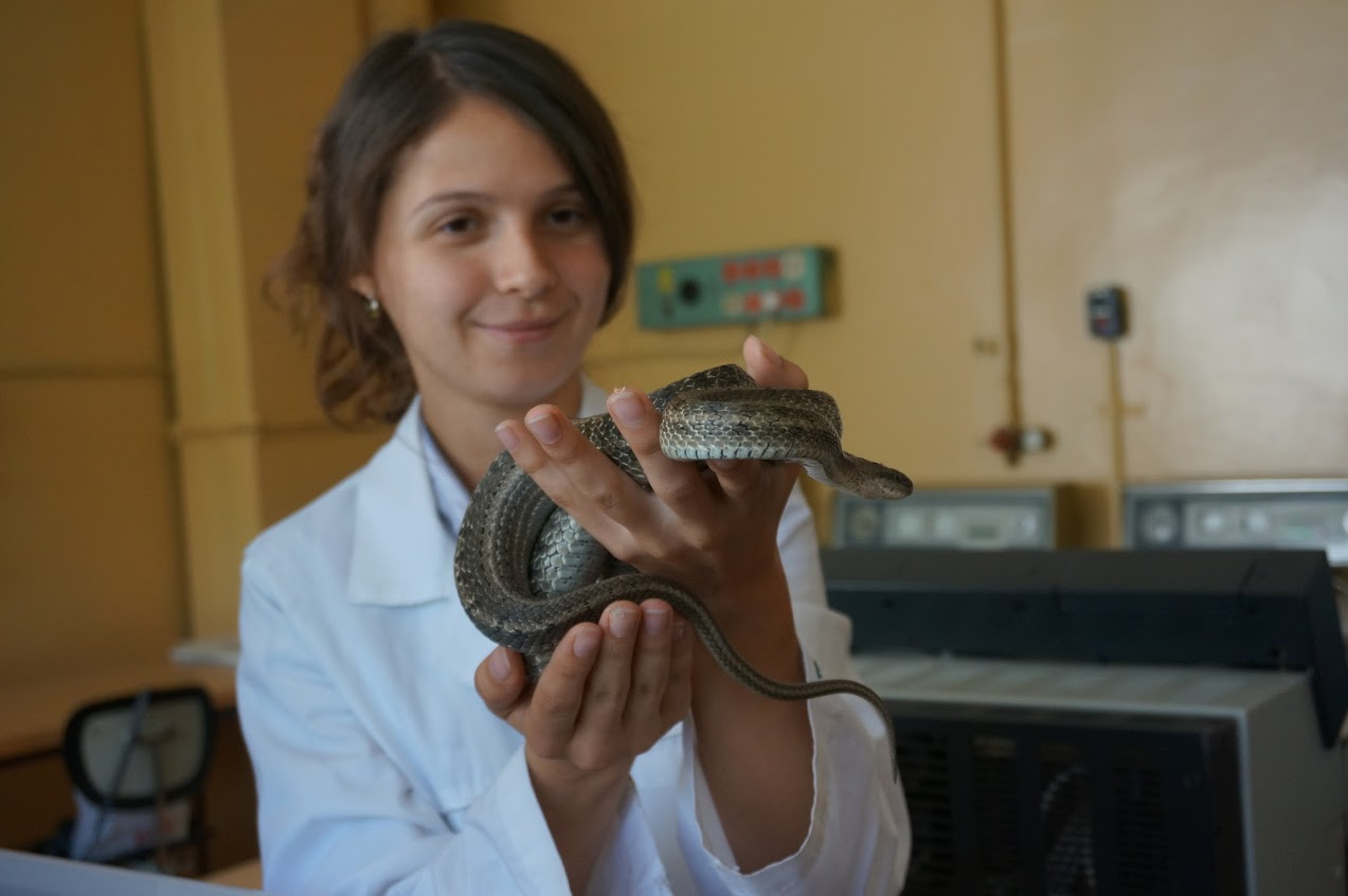 Сотрудница института экологии Волжского бассейна РАН Анастасия Поклонцева в змеином питомнике со своим питомцем - узорчатым полозом (Elaphe dione)